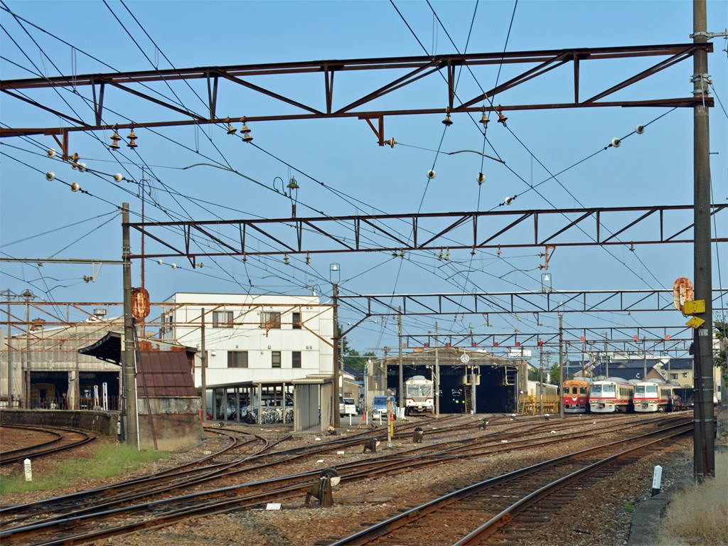 富山地方鉄道本線 稲荷町駅構内及び稲荷町テクニカルセンター